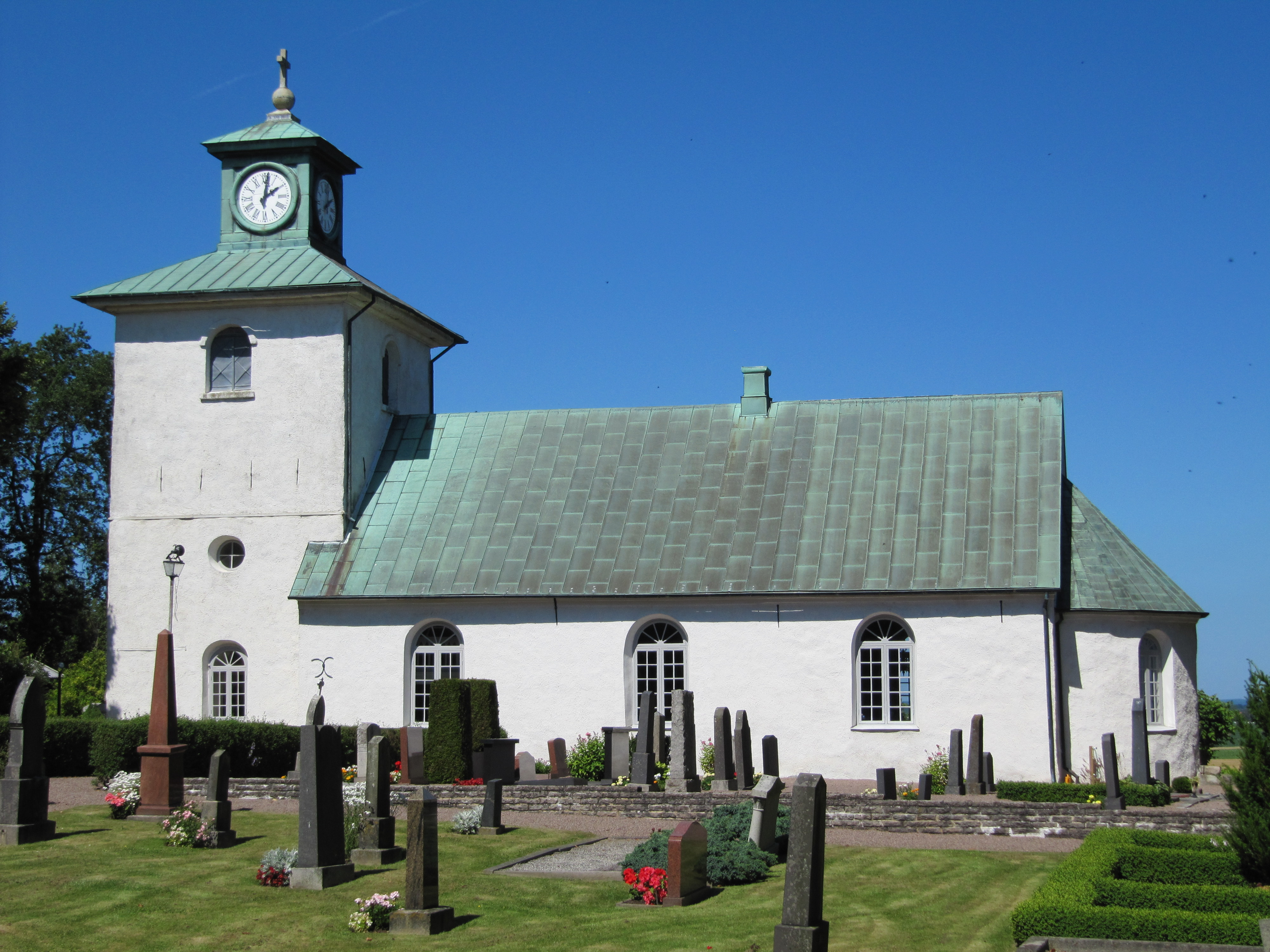 Starby kyrka